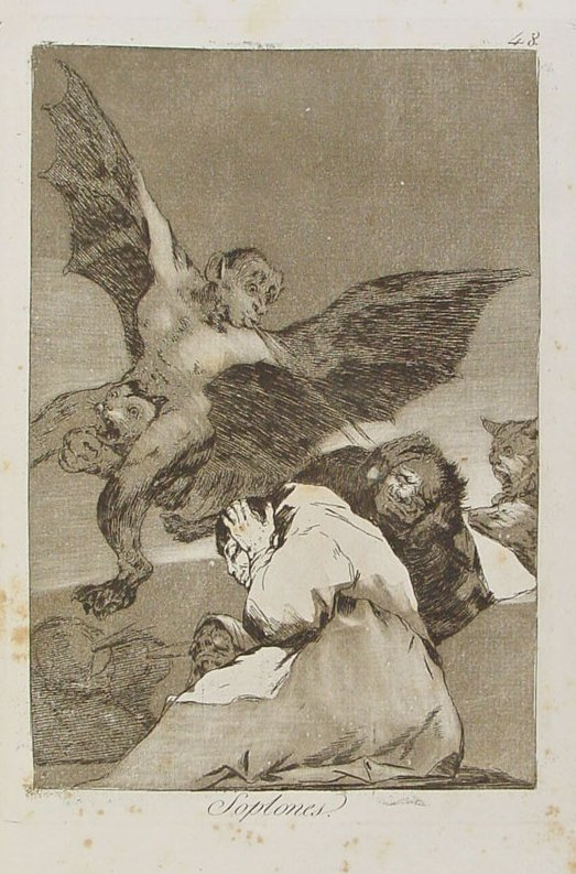 «Soplones» Capricho nº 48 de Goya, serie Los Caprichos